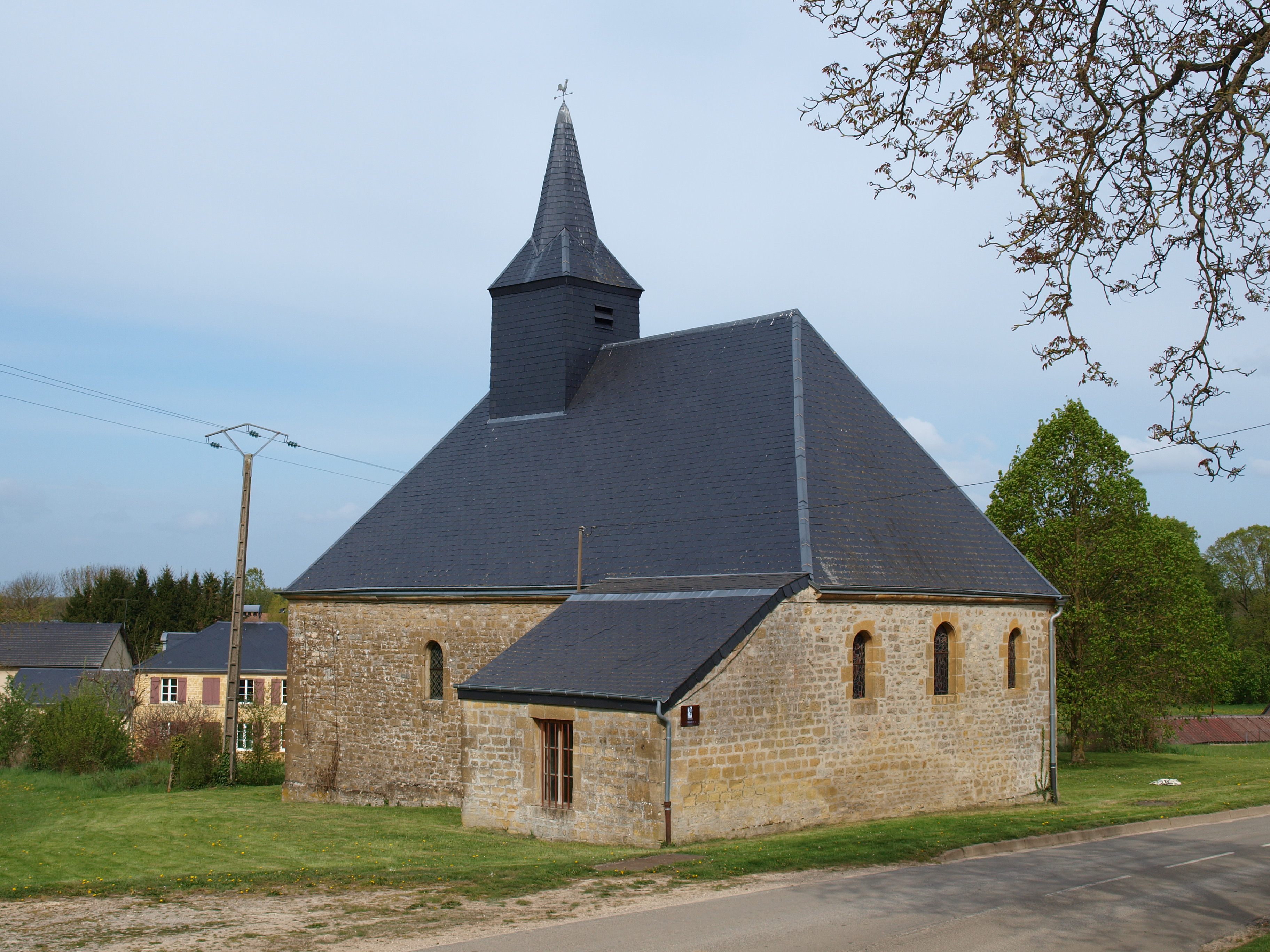 Les Petites-Armoises (Ardennes, France)